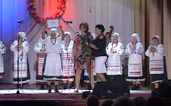 Колектив "Горлиця " м Носівка